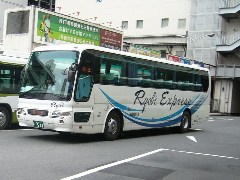 登録番号 岡山200か・567 両備バス所属 サンサンライナー号用 2007年2月26日 広島バスセンターにて撮影